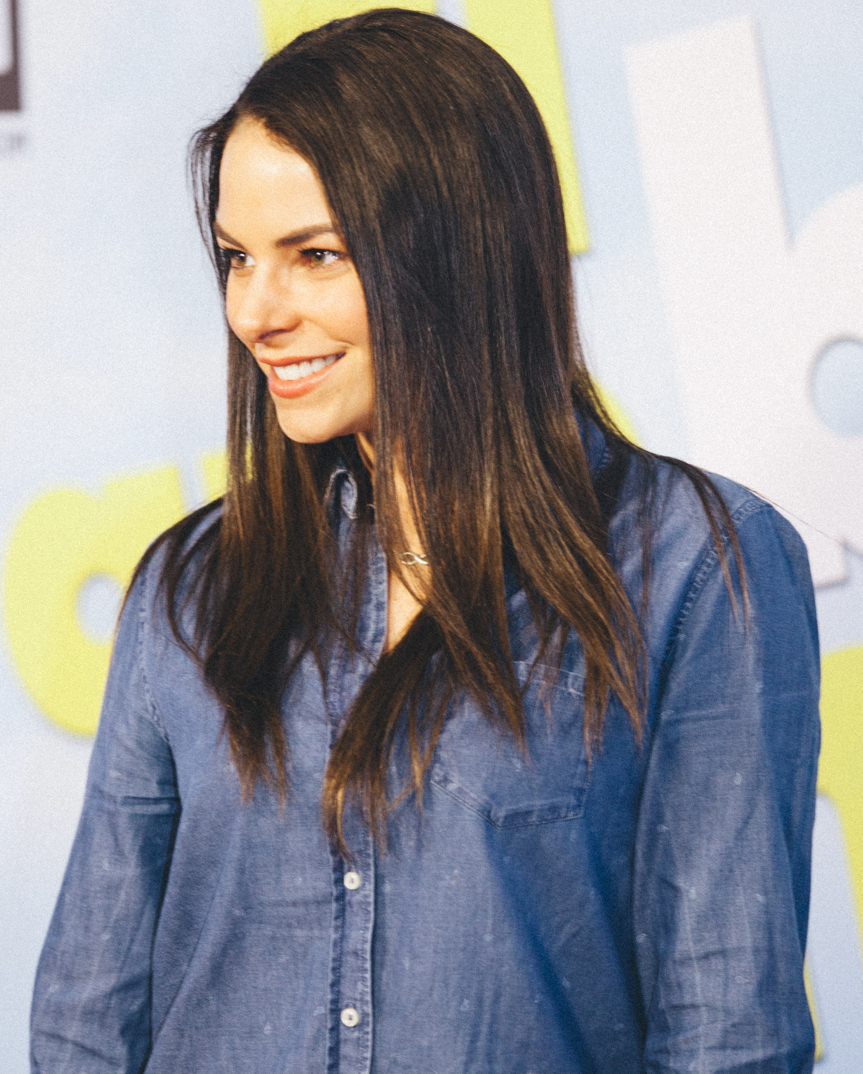 Alejandra Robles en Cinépolis Plaza Universidad